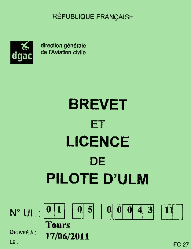 Brevet ULM français